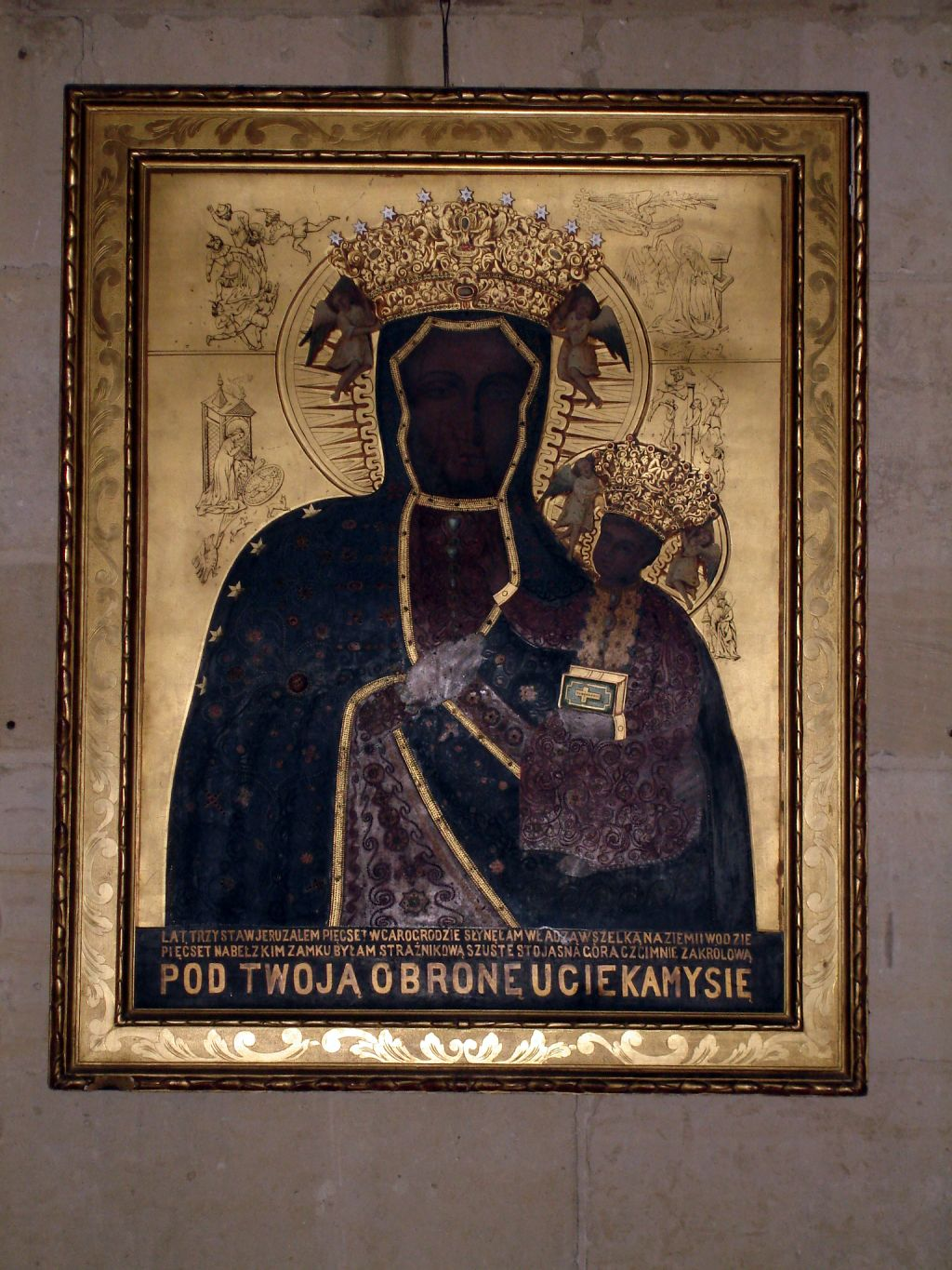 Vierge noire de Częstochowa - Collégiale saint-Martin de Montmorency, Val-d'Oise (France) - Juillet 2006 Photo personnelle de clicsouris